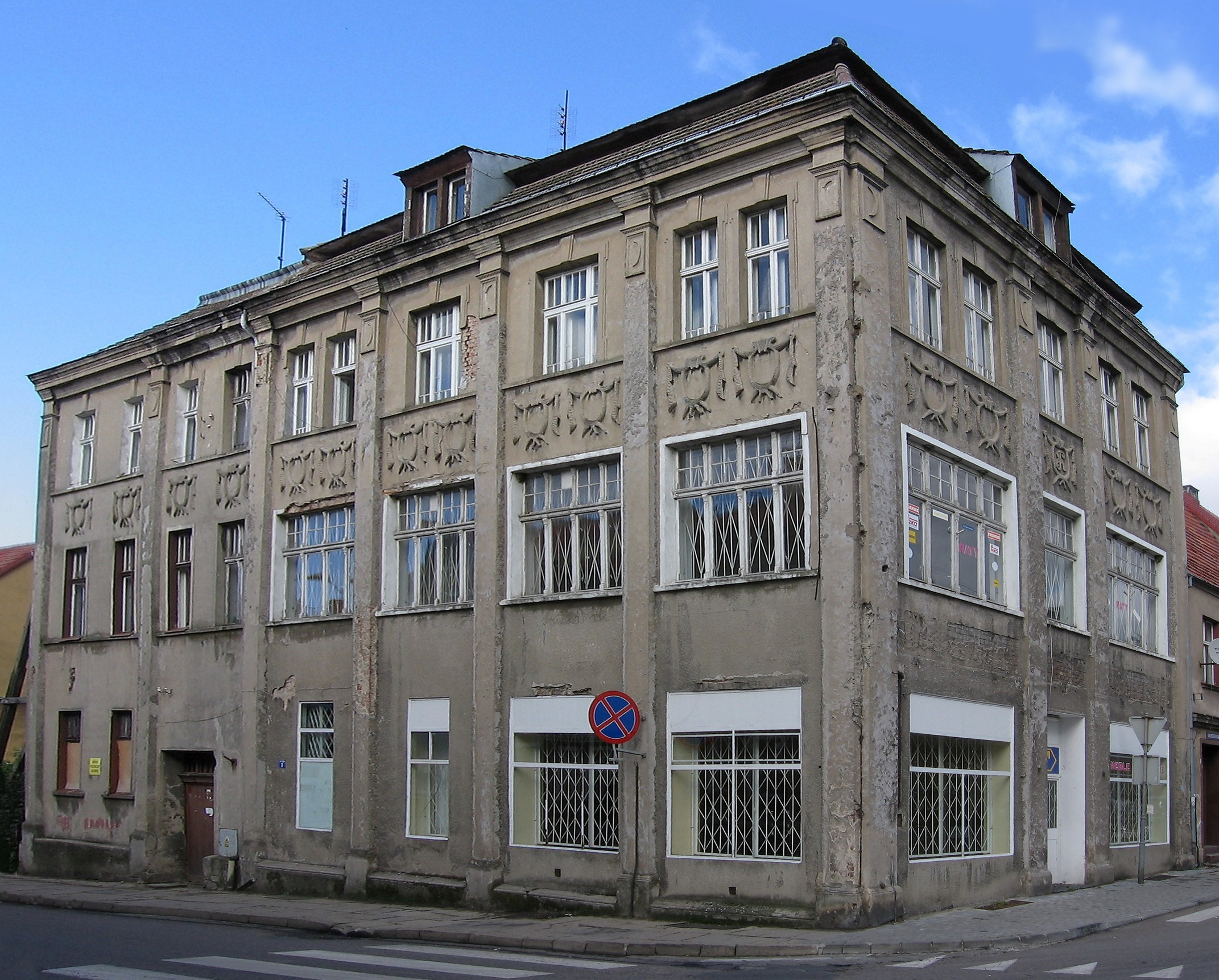 Zabytkowy budynek przy ulicy Witosa 7 w Trzebiatowie (woj. zachodniopomorskie).